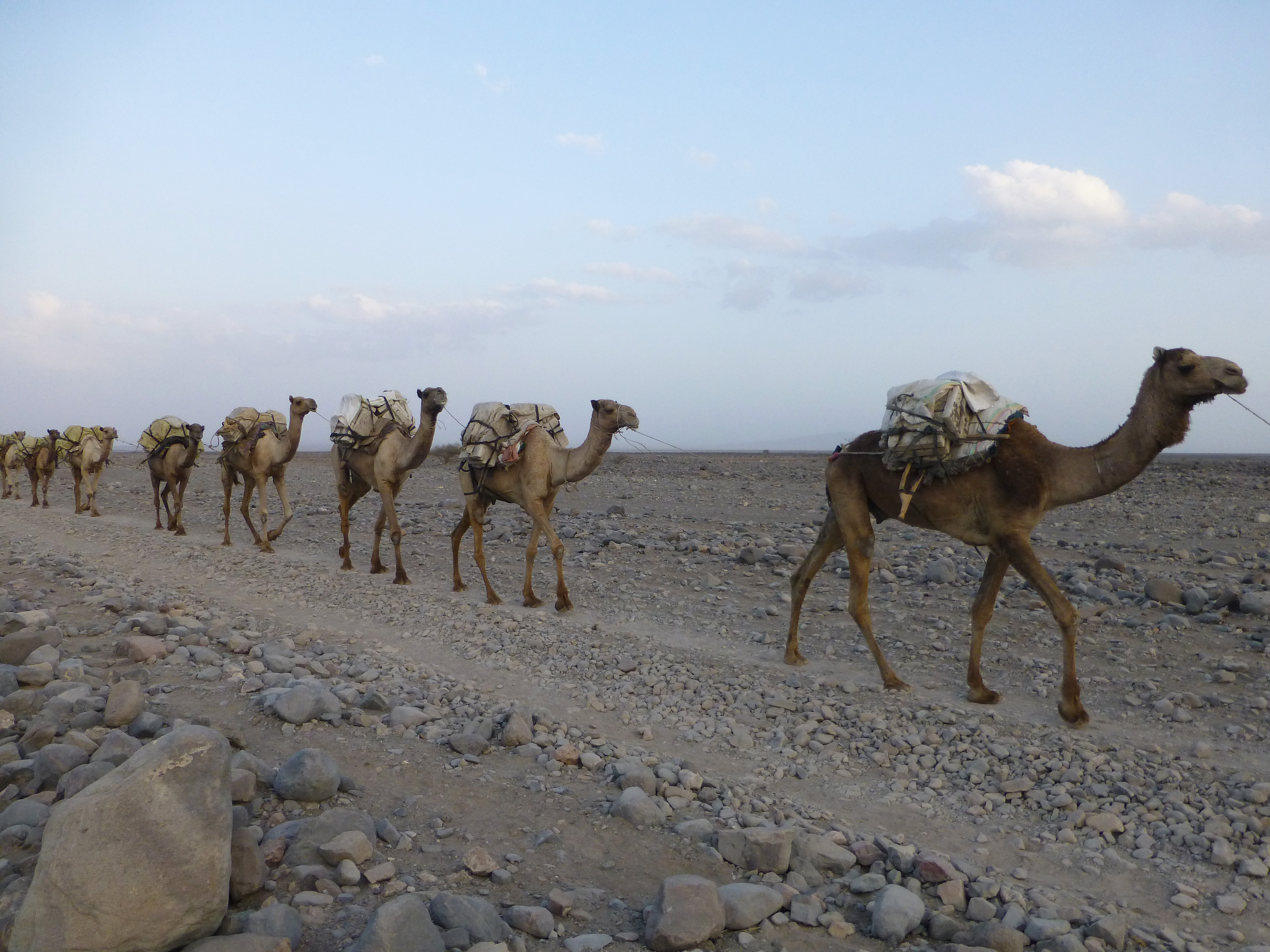 Ethiopie, région Afar, désert Danakil, entre Berhale et Ahmed Ela : caravane de sel